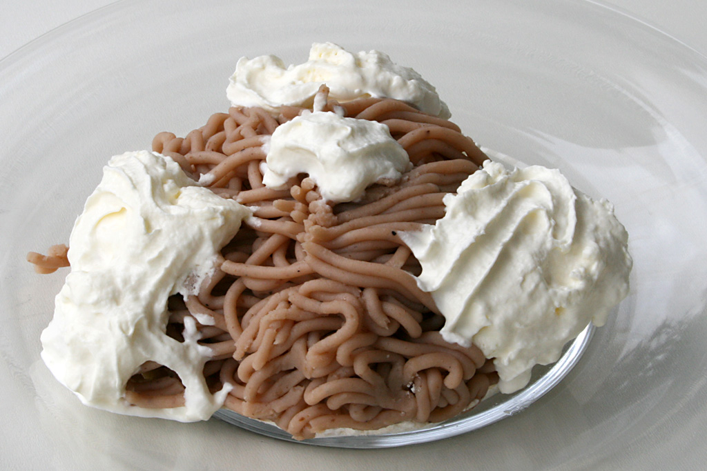 Vermicelles